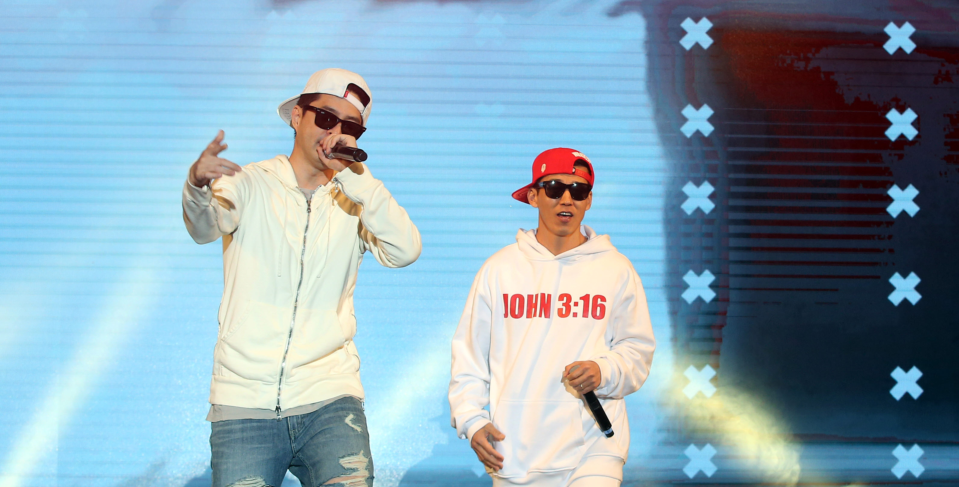 Hello, Mr K! Concert Jinusean April 21, 2016 US Army Garrison-Yongsan Ministry of Culture, Sports and Tourism Korean Culture and Information Service ( Official Photographer : Jeon Han This official Republic of Korea photograph is being made available only for publication by news organizations and/or for personal printing by the subject(s) of the photograph. The photograph may not be manipulated in any way. Also, it may not be used in any type of commercial, advertisement, product or promotion that in any way suggests approval or endorsement from the government of the Republic of Korea. 헬로, 미스터 K! 콘서트 지누션 2016-04-21 주한 미육군 용산기지 문화체육관광부 해외문화홍보원 코리아넷 전한